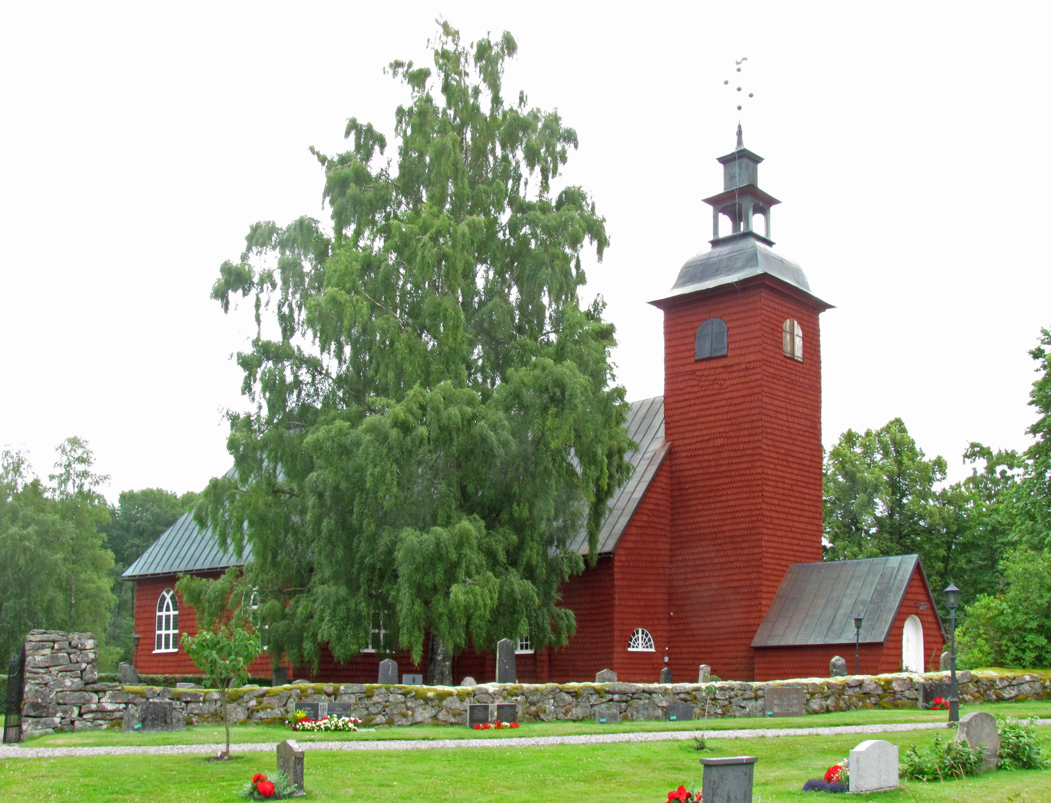 Bjurtjärns kyrka